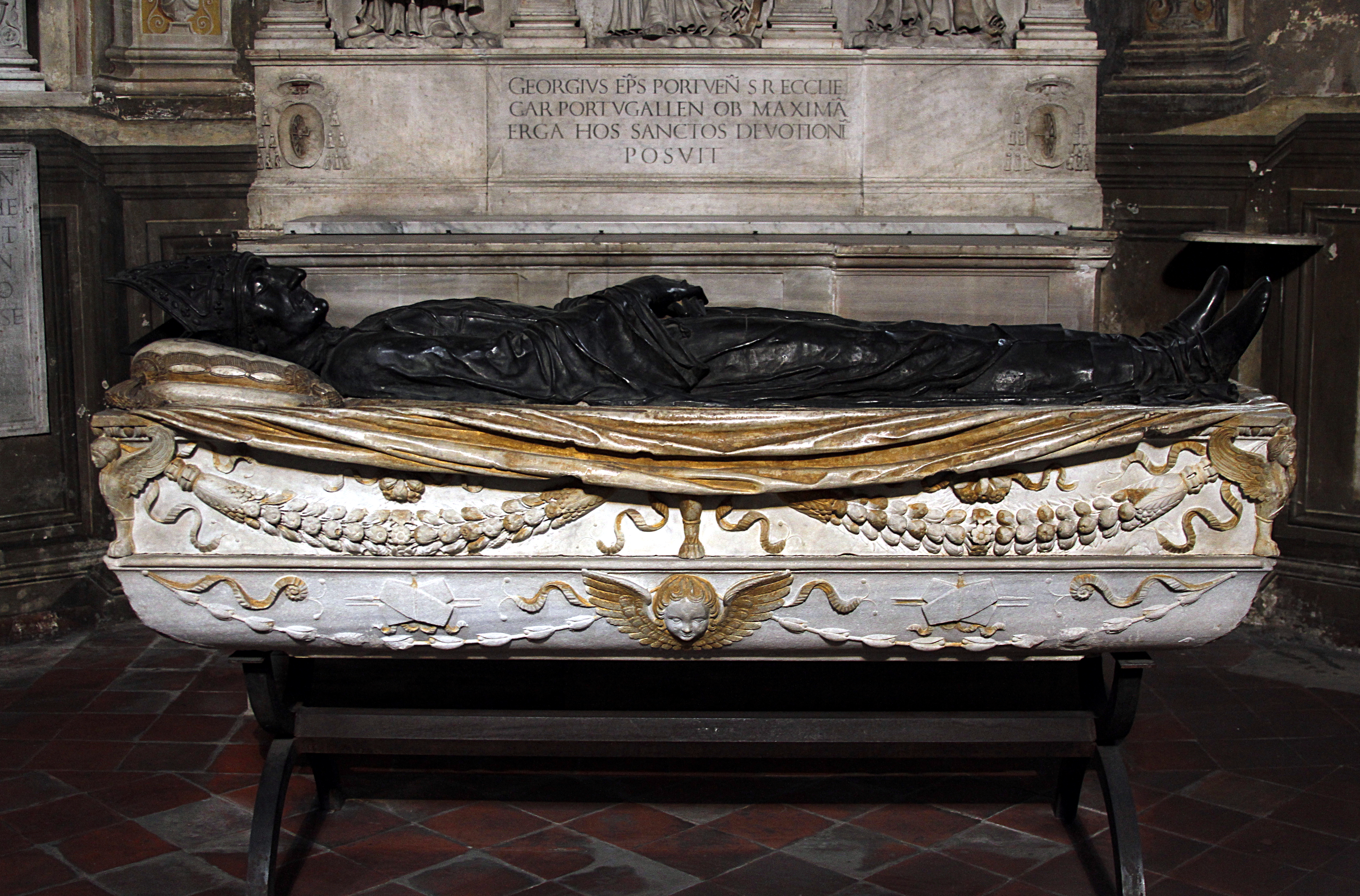 Santa Maria del Popolo - Rome